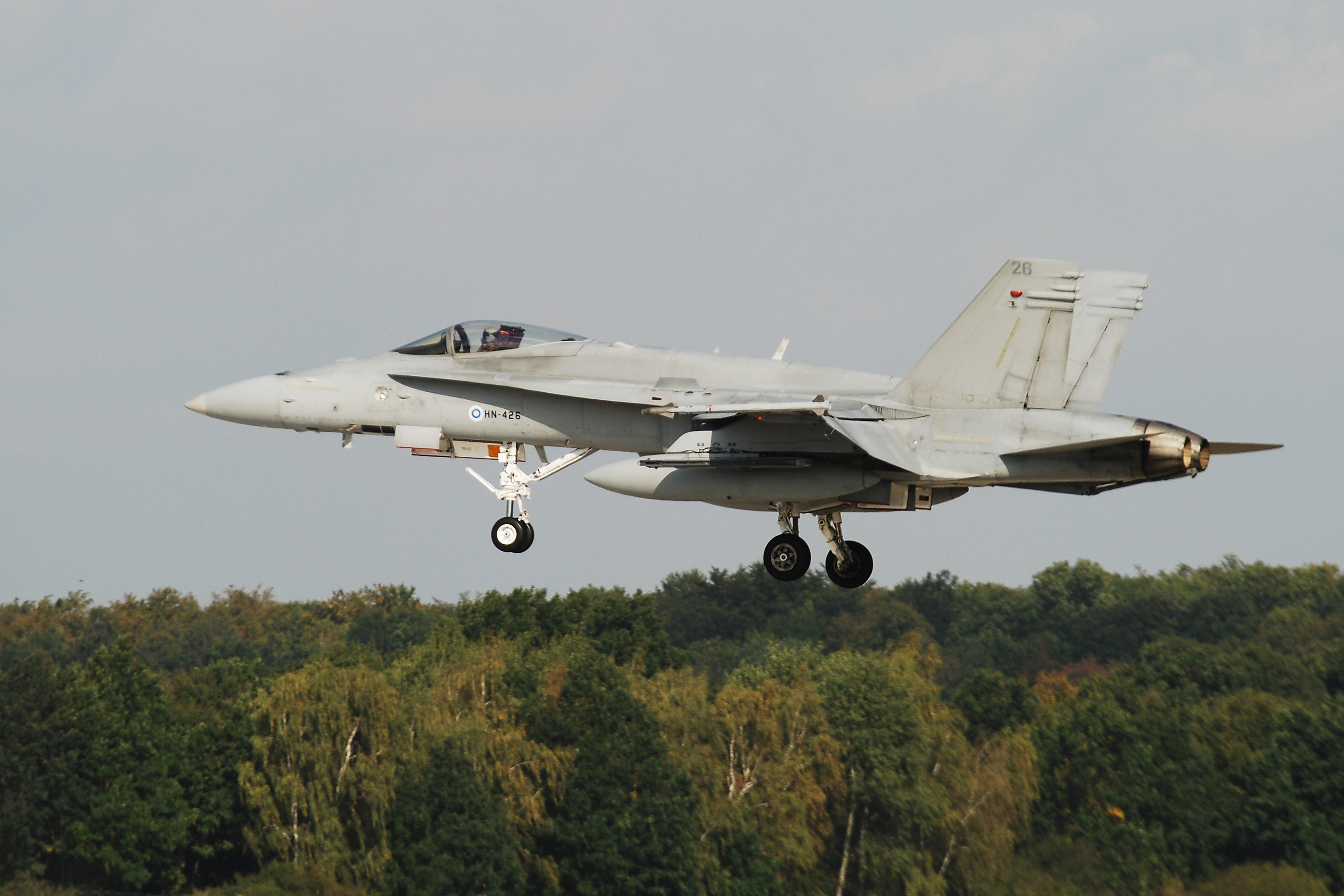 imx00000367